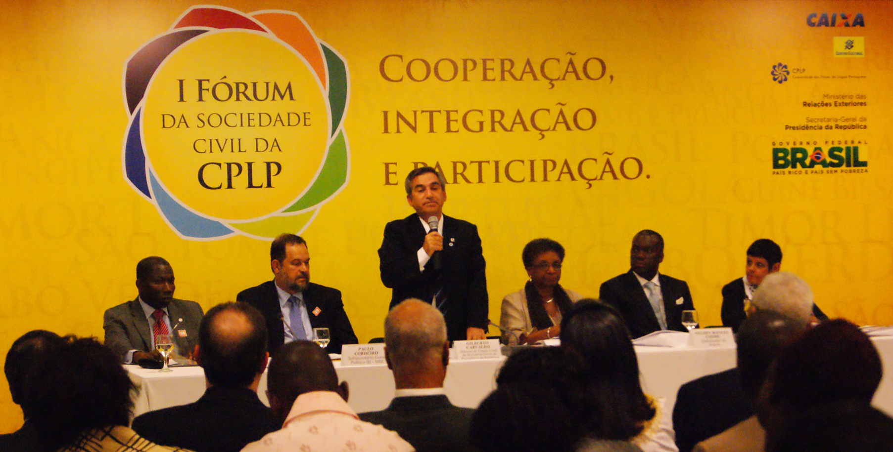 I Fórum da Sociedade Civil da Comunidade dos Países de Língua Portuguesa